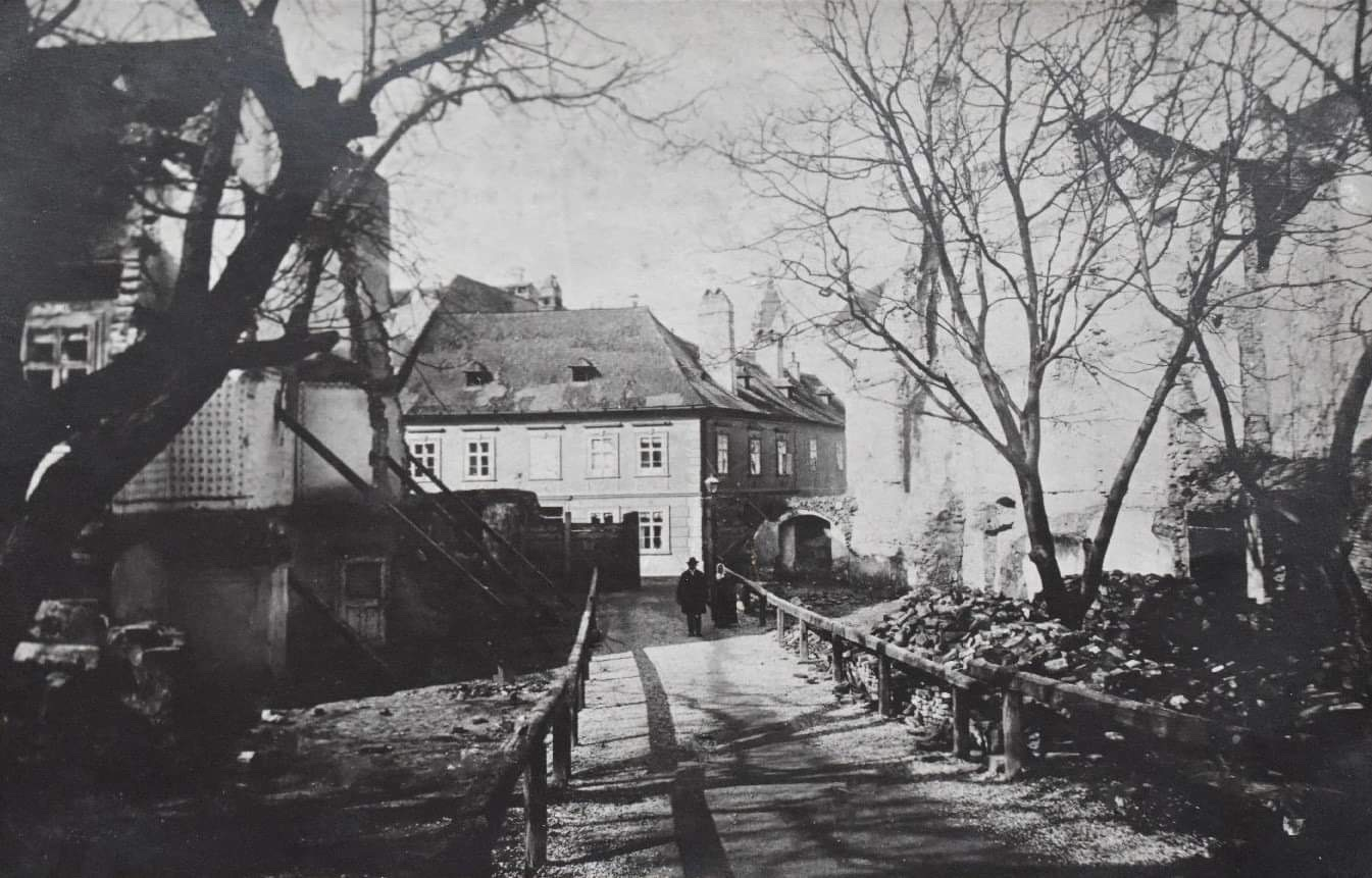 Zustand gegen Ende des 19. Jh vor Beginn der Bauarbeiten. Auf diesem Gelände wurde zwischen 1908 und 1910 die Alte Markthalle in Preßburg erbaut.